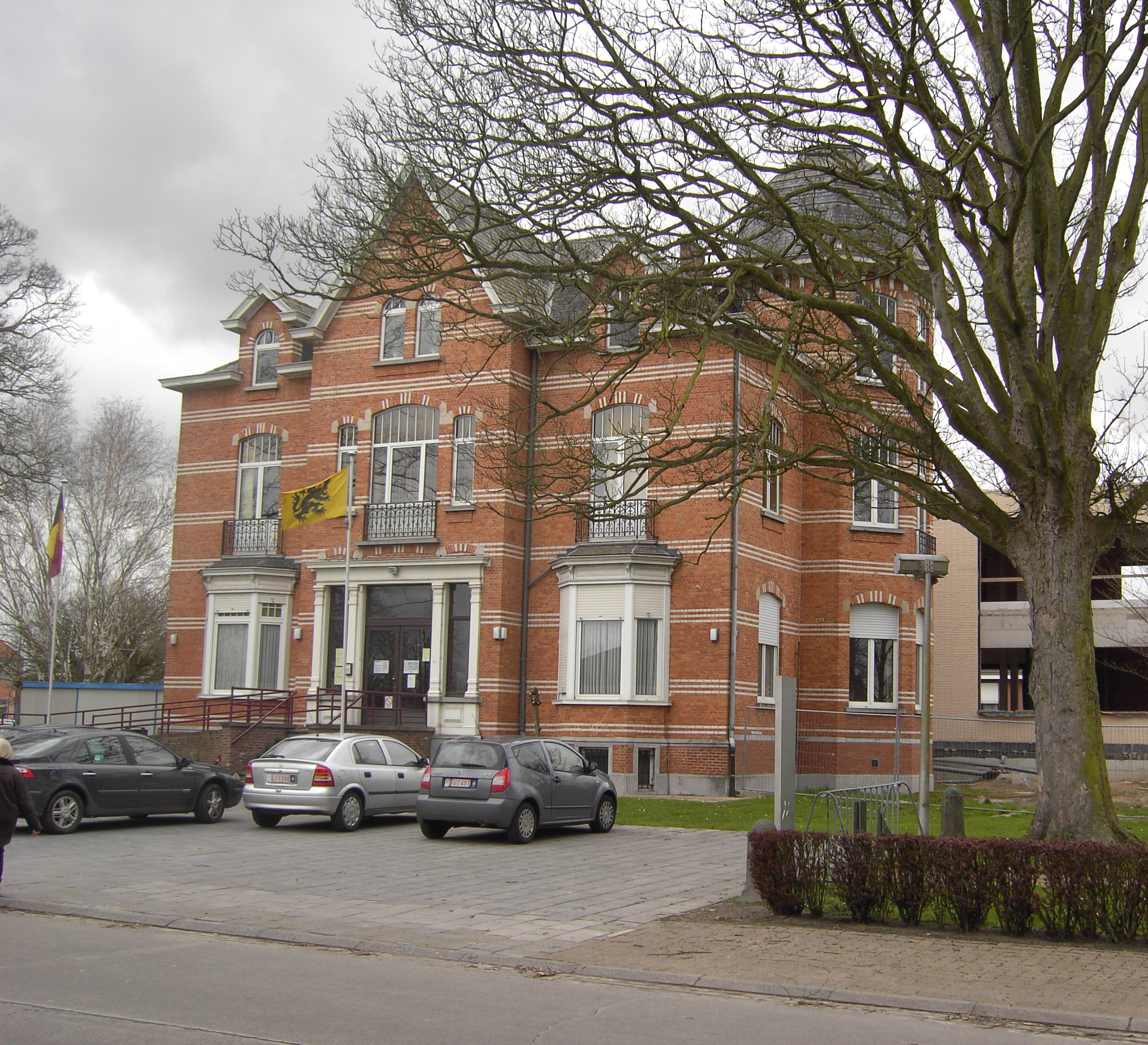 Zingem - Belgium - Town hall